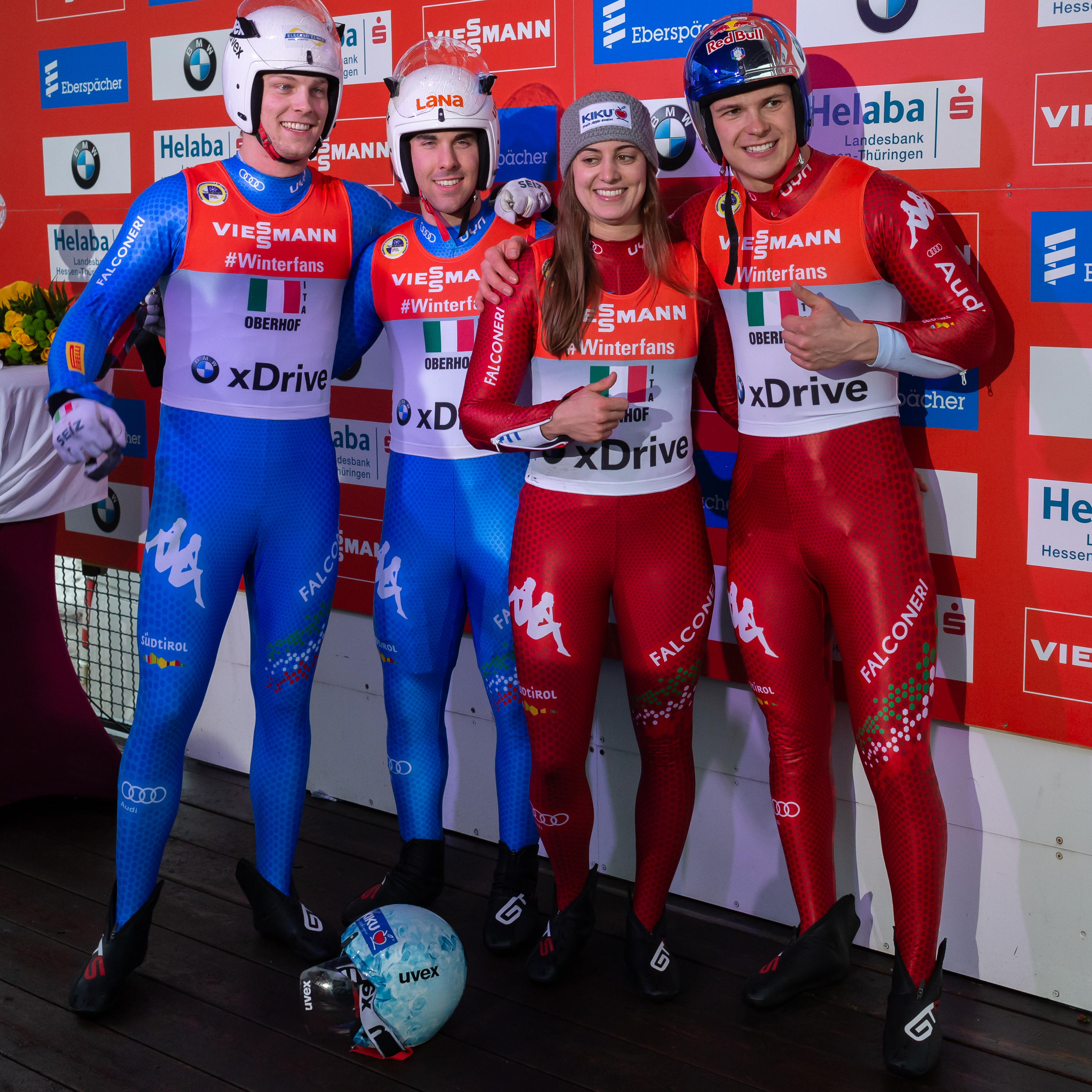 Viessmann Luge World Cup Oberhof; v.li.: Ivan Nagler (ITA, Italien), Fabian Malleier (ITA, Italien), Andrea Voetter (ITA, Italien), Dominik Fischnaller (ITA, Italien); italienische Teamstaffel in der Leaders Box; Sieger, Erstplatzierter, Goldmedaille, gold medal